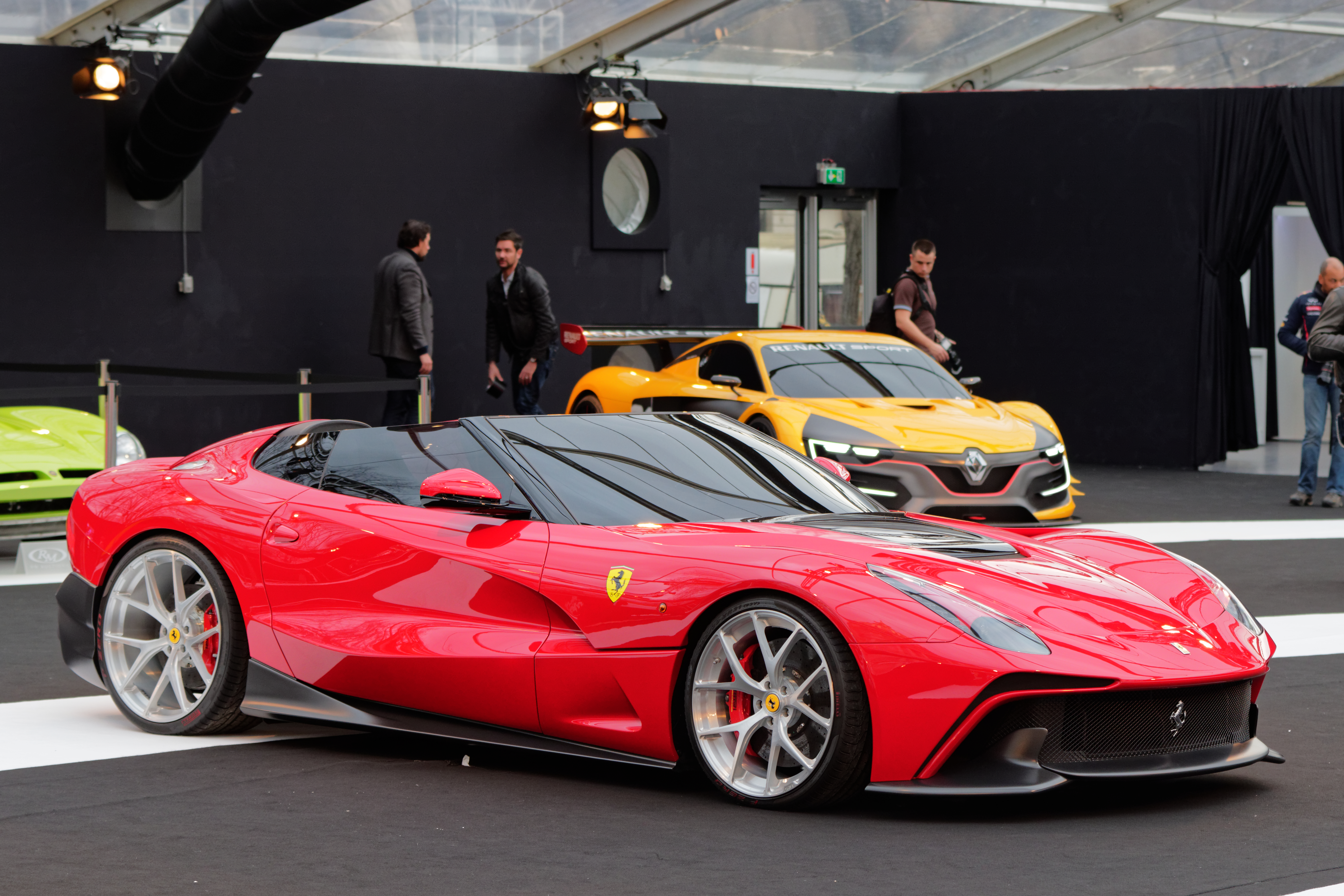 La Ferrari F12 TRS exposée lors du festival automobile international 2015.